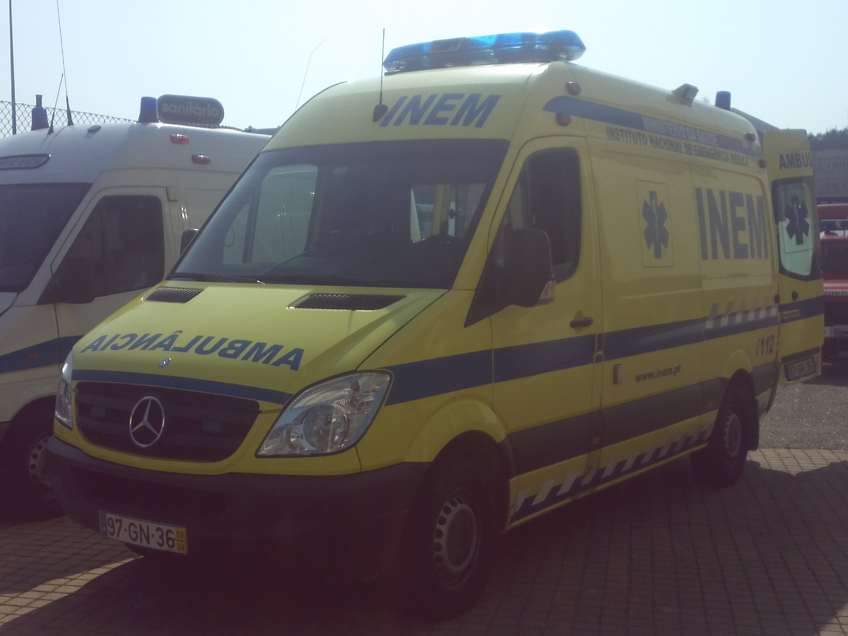 Ambulância atribuida pelo INEM à CBS Coimbra